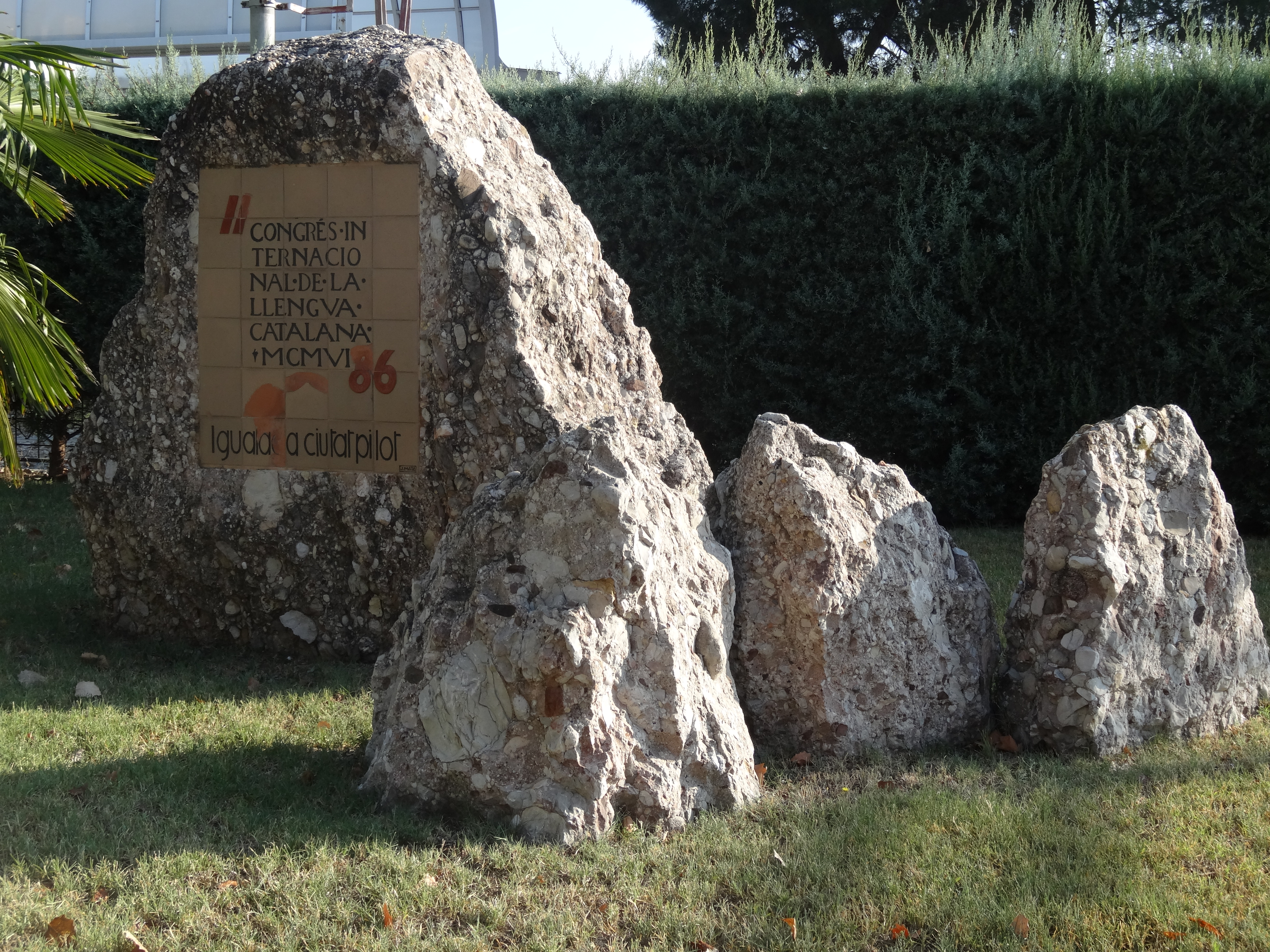 Memorial del II Congrés Internacional de la Llengua Catalana - 1986 Igualada ciutat pilot. Ubicat al costat de l'estació de tren d'igualada.